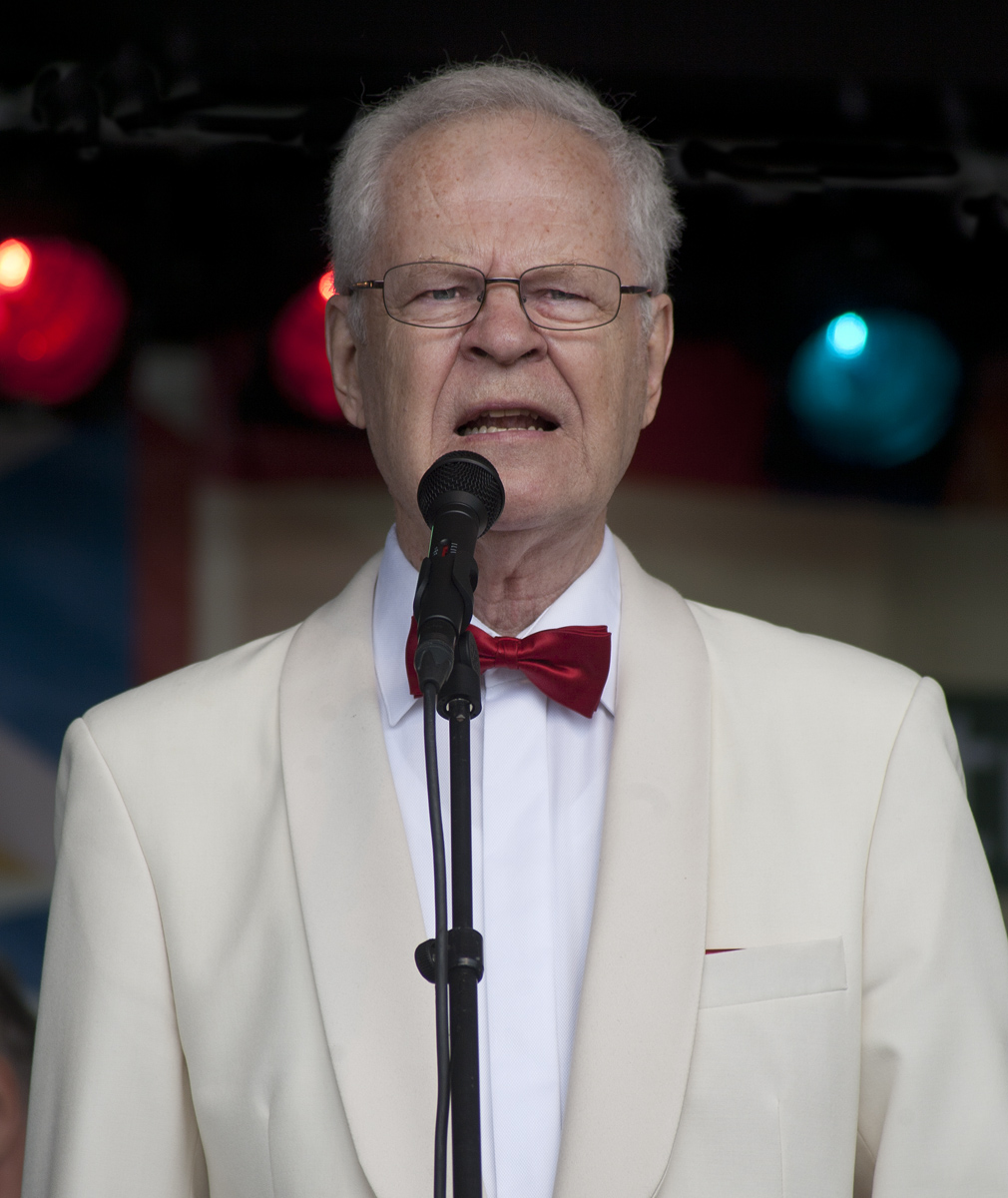 Laulaja ja muusikko Pentti Lasanen esiintymässä lauluyhtye Four Catsin kanssa Helsingin Kaisaniemessä Maailma kylässä -festivaalilla 25.5.2014.